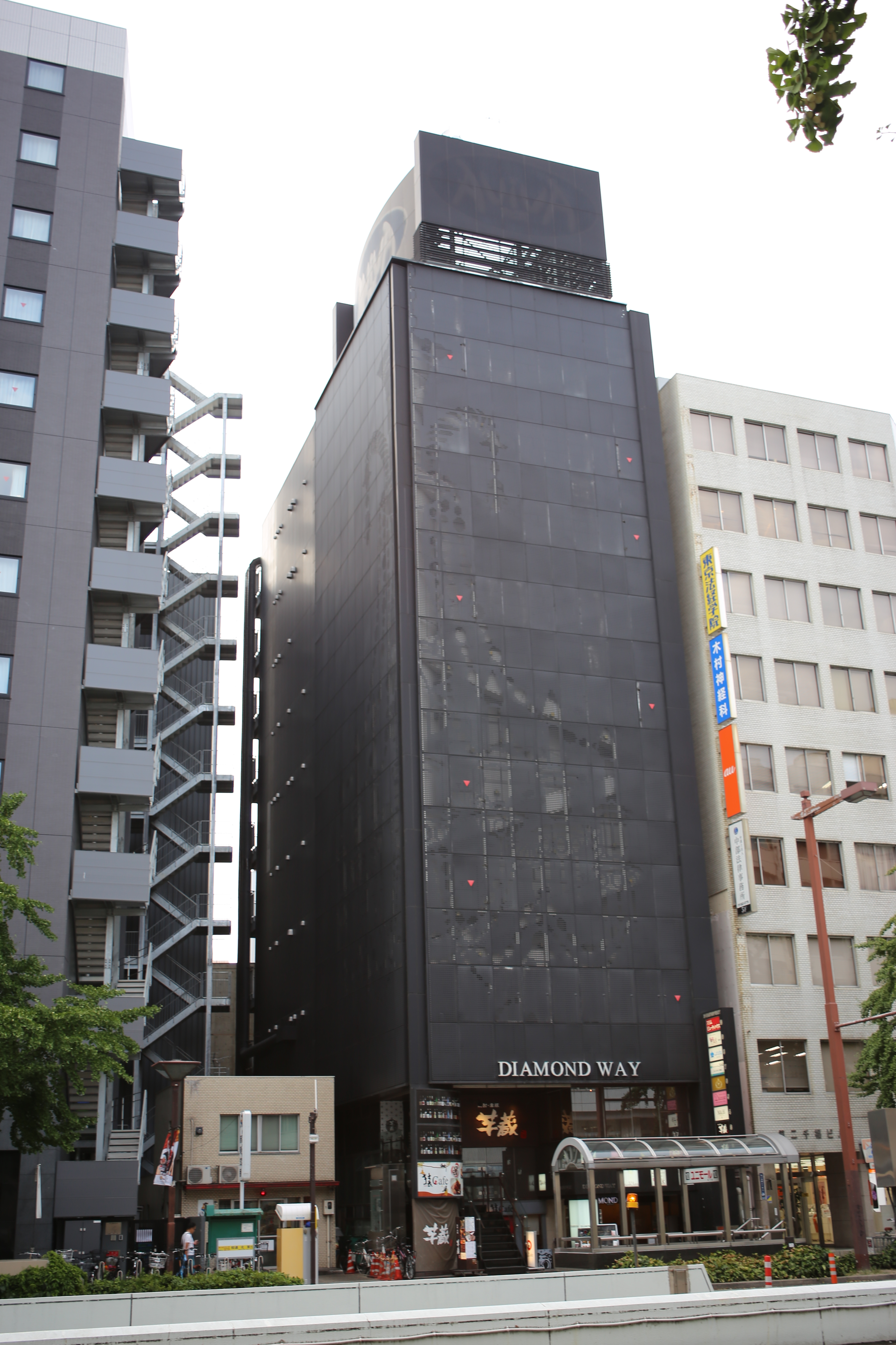 名古屋市中村区名駅三丁目のDIAMOND WAY（旧アビバジャパン本社）を南側公道西側より撮影